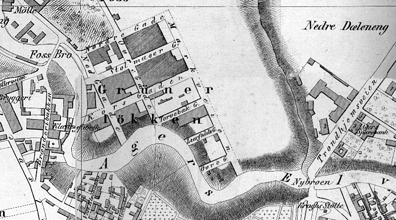 Norsk (bokmål): Kart over Ny York, Oslo, 1861.